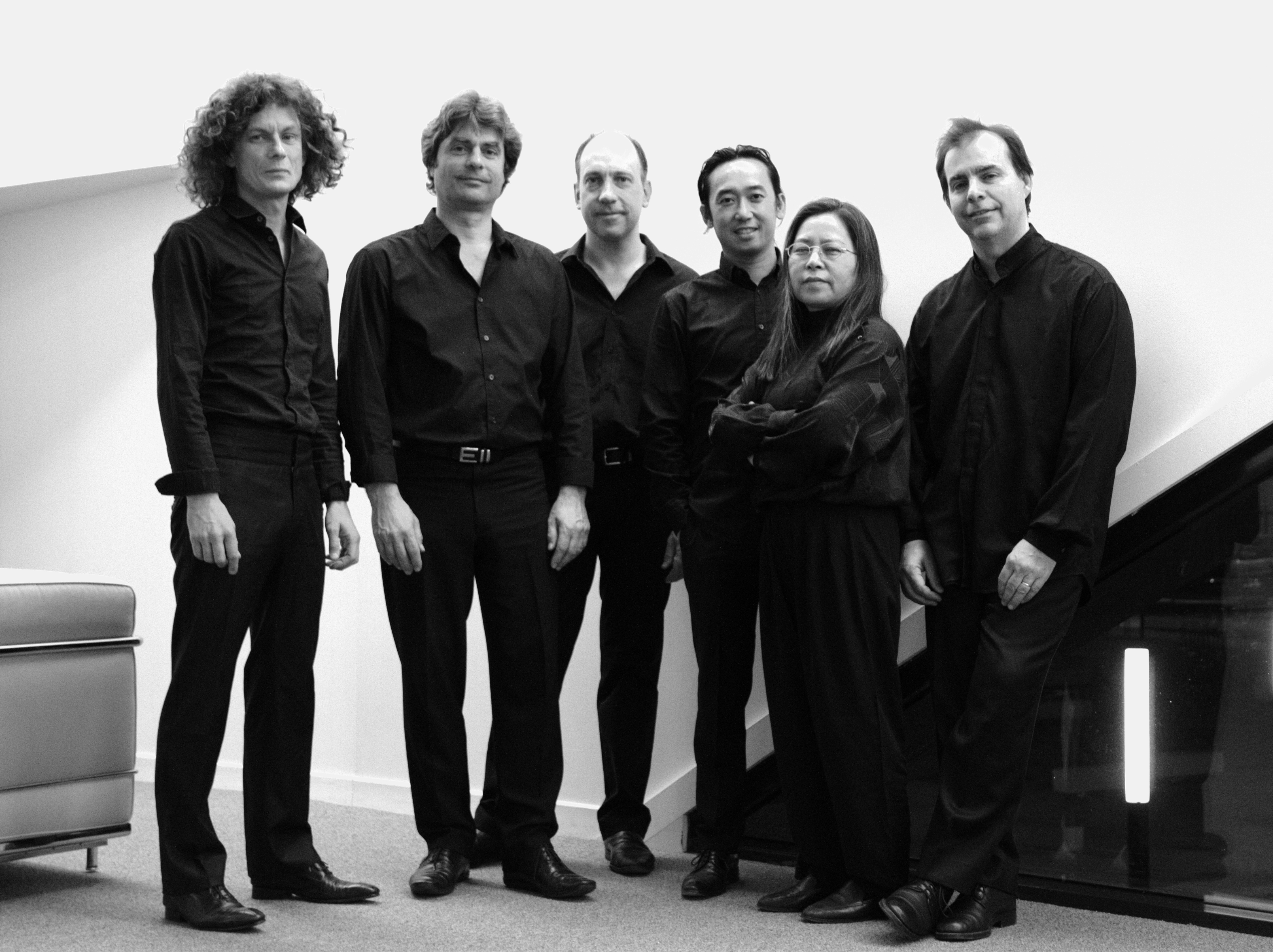 Les Percussions de Strasbourg est un ensemble de musique contemporaine fondé en 1962 et composé de six percussionnistes. De gauche à droite : François Papirer, Olaf Tzschoppe, Bernard Lesage, Minh-Tam Nguyen, Keiko Nakamura et Claude Ferrier.